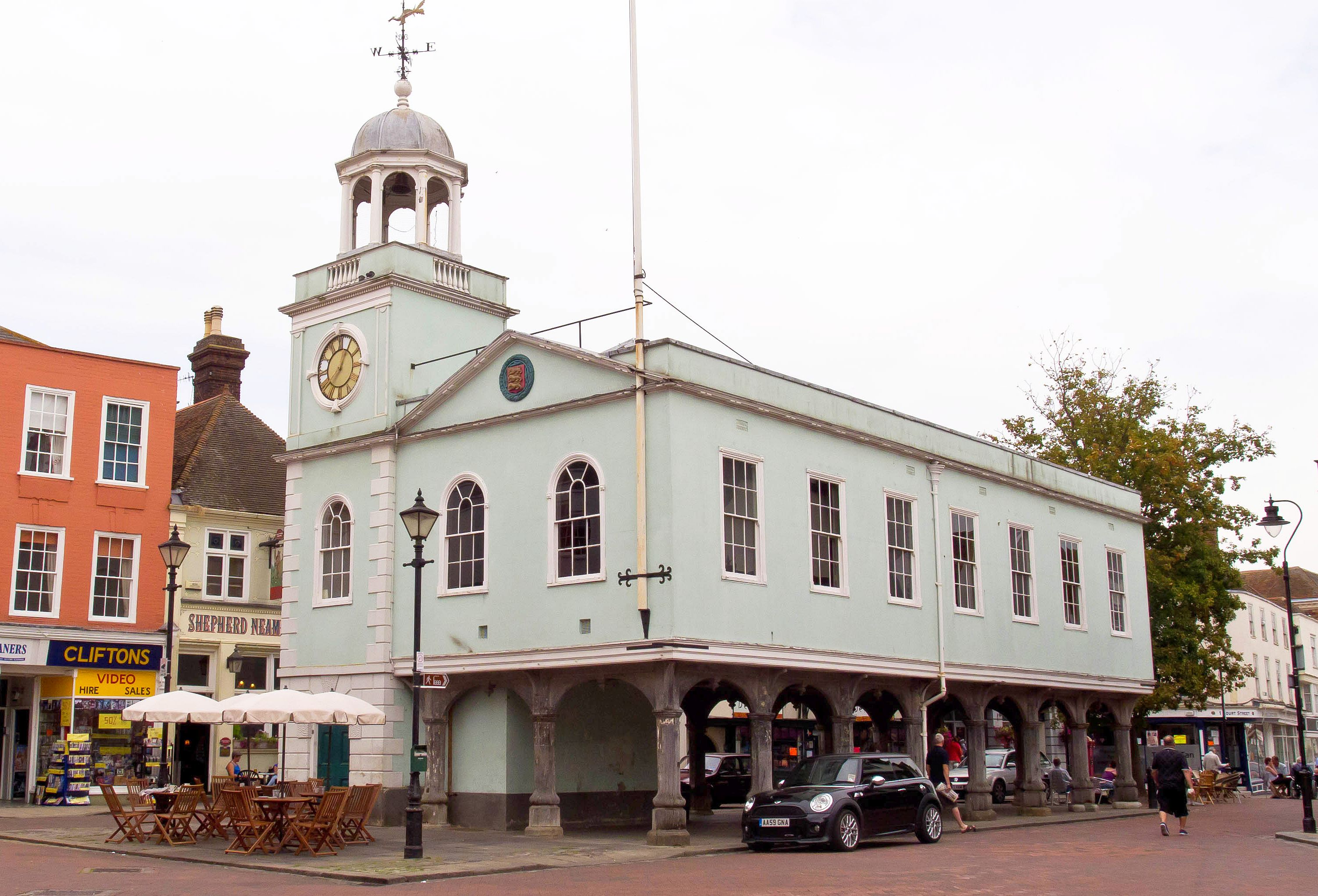 Faversham